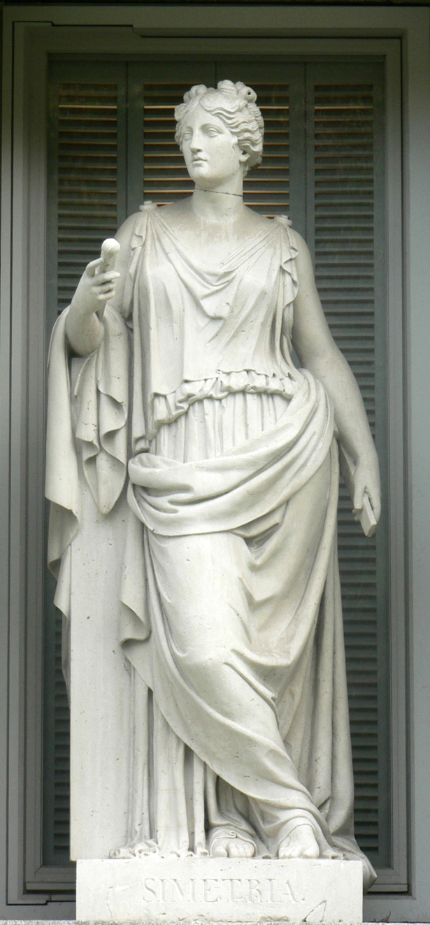 Estatua alegórica de la Simetría, esculpida en mármol entre 1830 y 1836, por Valeriano Salvatierra, en la fachada del Museo del Prado, Madrid.